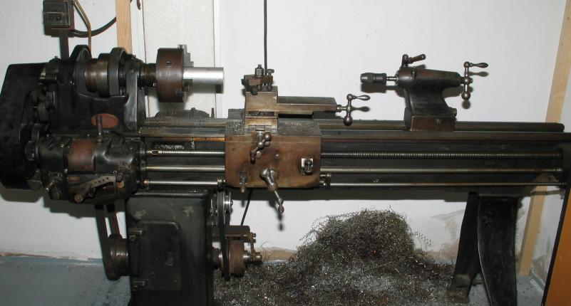 Beschreibung: Drehbank Mit Leit- und Zugspindel Hersteller Dolze & Slotta GmbH, Coswig (Sachsen) Geschätztes Baujahr: ca. 1930 Quelle: Fotografie am 27.03.2004 Fotograf: Michael Häckel Lizenzstatus: Public Domain 17:14, 27. Mär 2004 MichaelHaeckel 801 x 430 (48138 Byte)